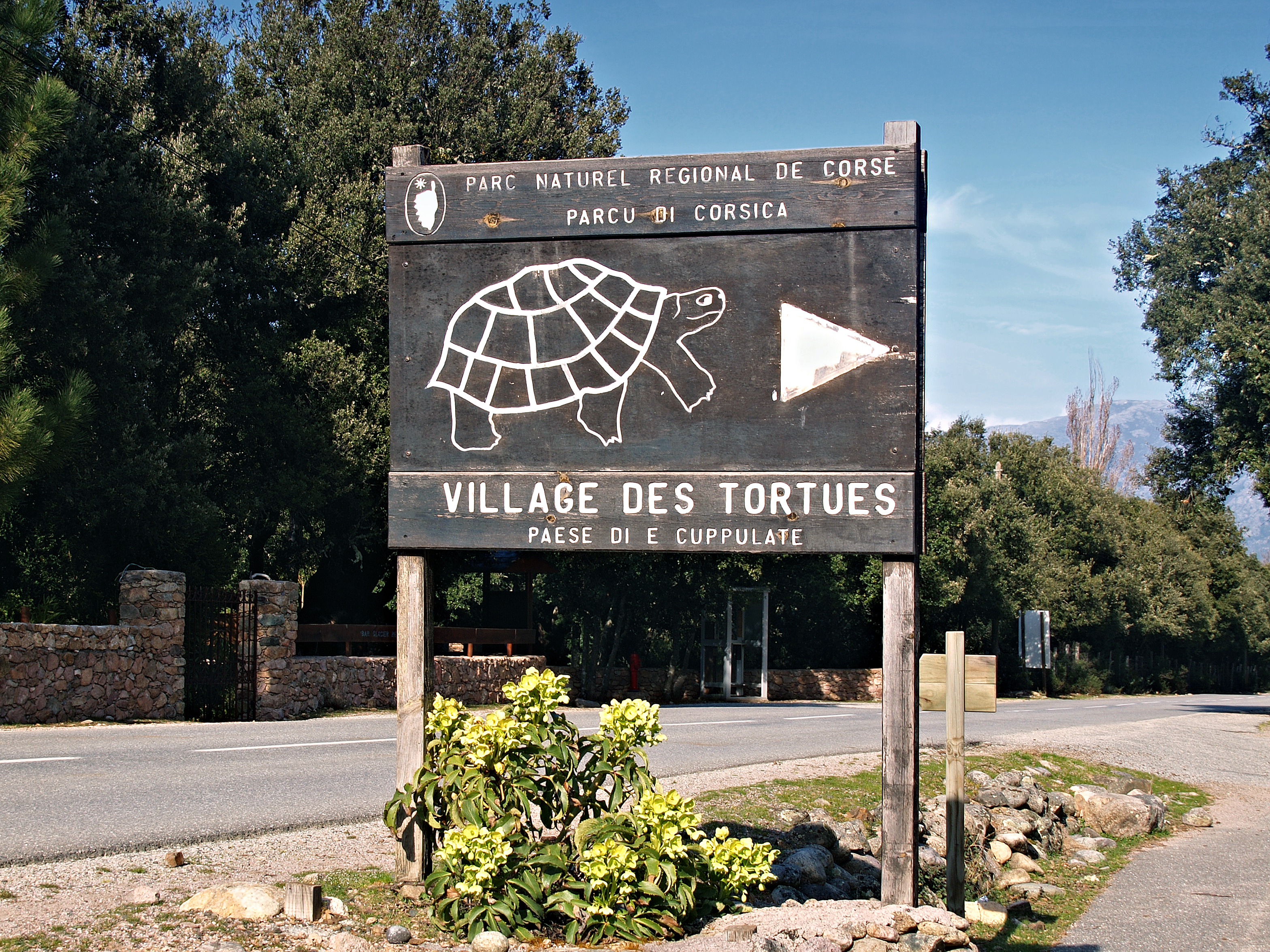 Signalisation en bordure de route, du Village des Tortues du parc naturel régional de Corse